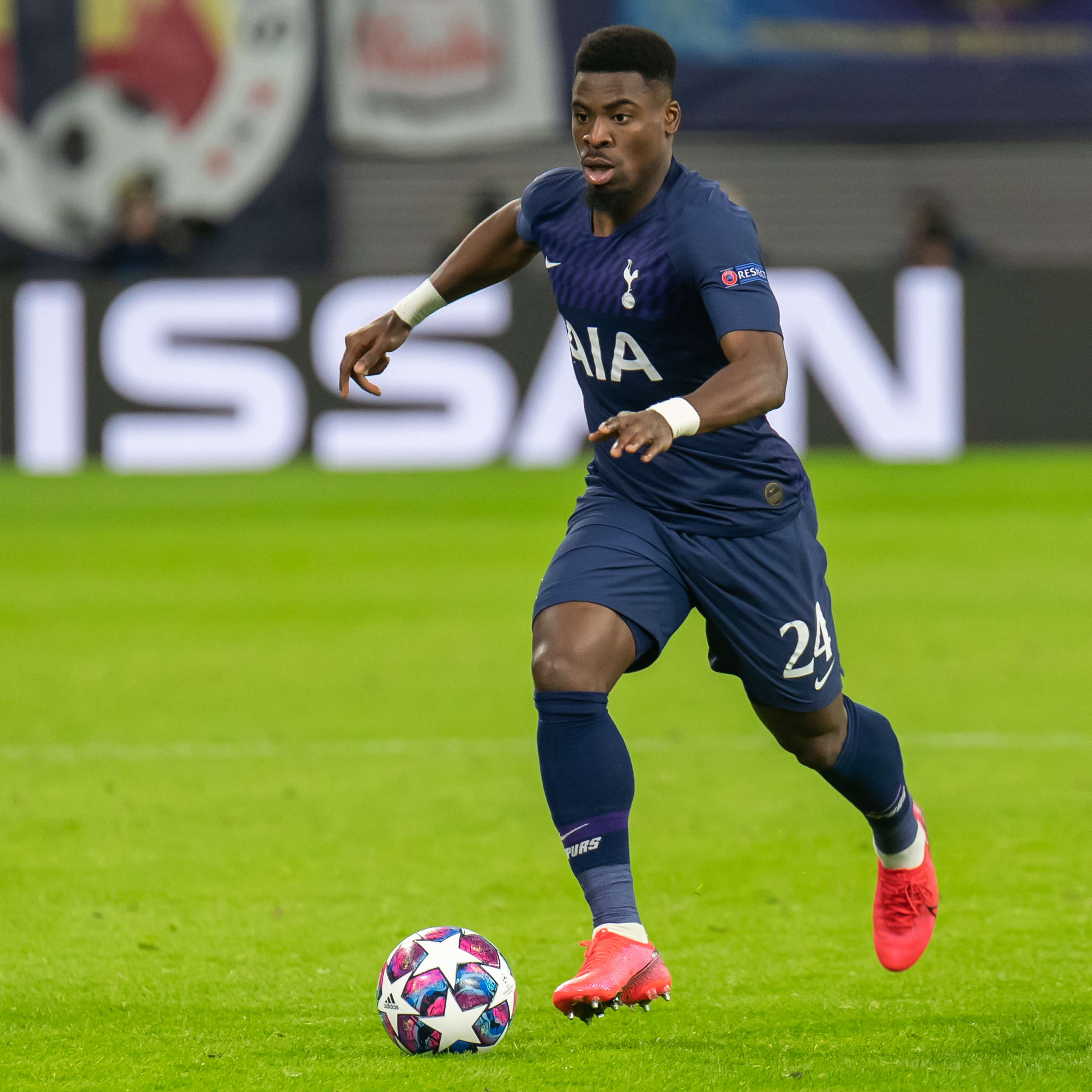 Fußball, Männer, UEFA Champions League Achtelfinale, RB Leipzig - Tottenham Hotspur; Serge Aurier (Tottenham Hotspur, 24); Freisteller, Einzelbild, Aktion, action